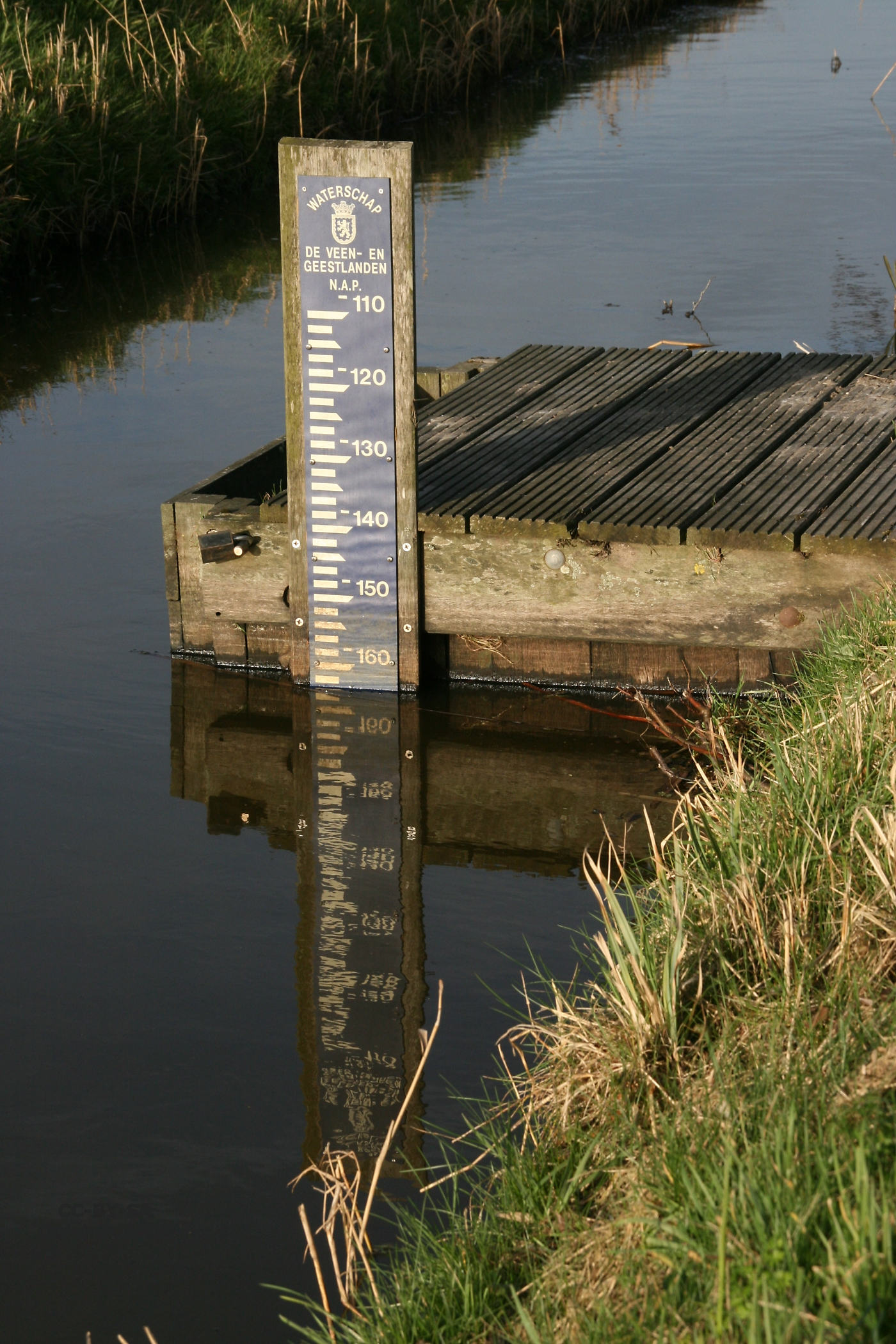 Peil voormalig waterschap De Veen- en Geestlanden Reference water level